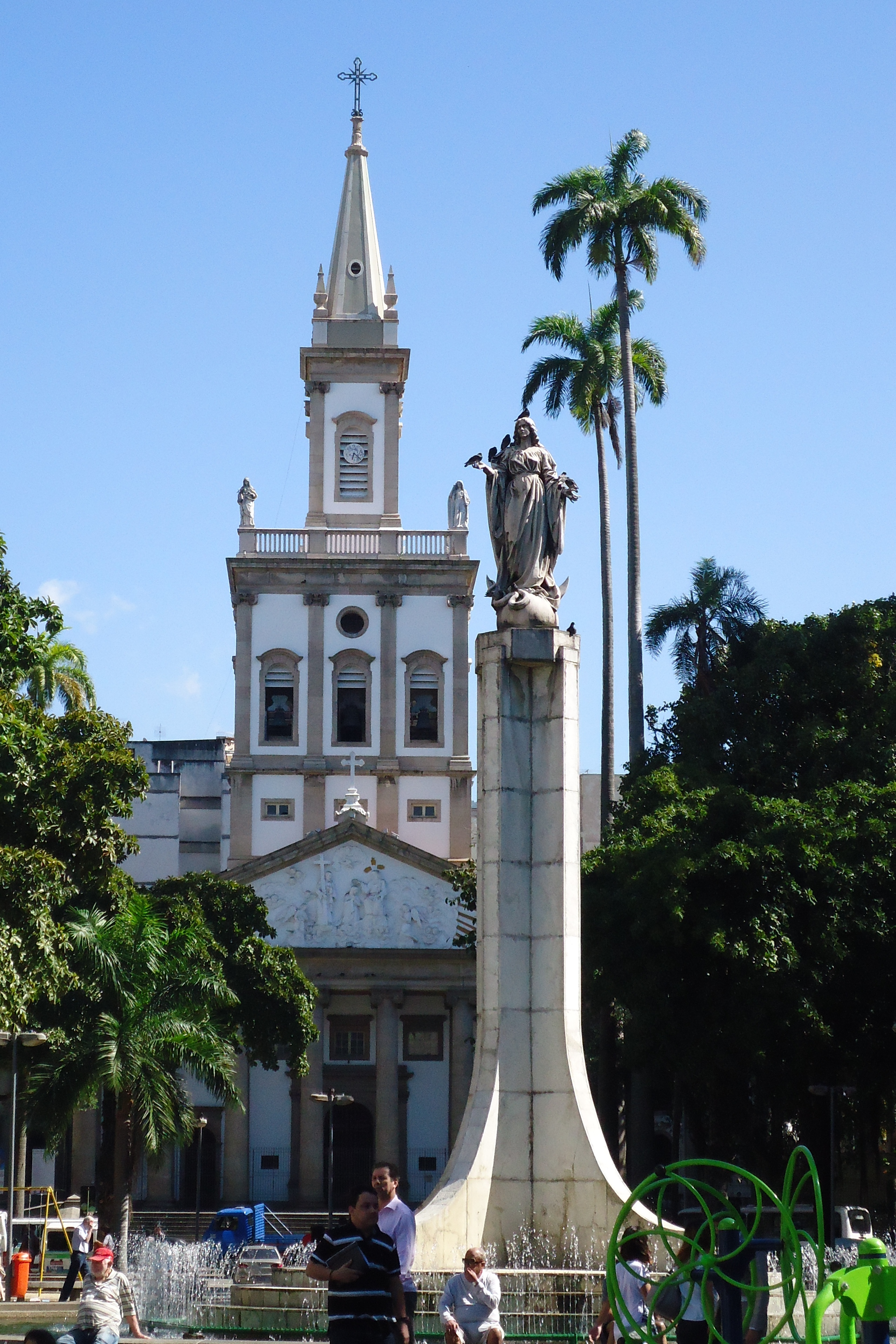 Largo do Machado, bairro do Catete, cidade e município do Rio de Janeiro, estado do Rio de Janeiro, Brasil: em primeiro plano a estátua de Nossa Senhora da Glória; ao fundo a igreja de Nossa Senhora da Glória.